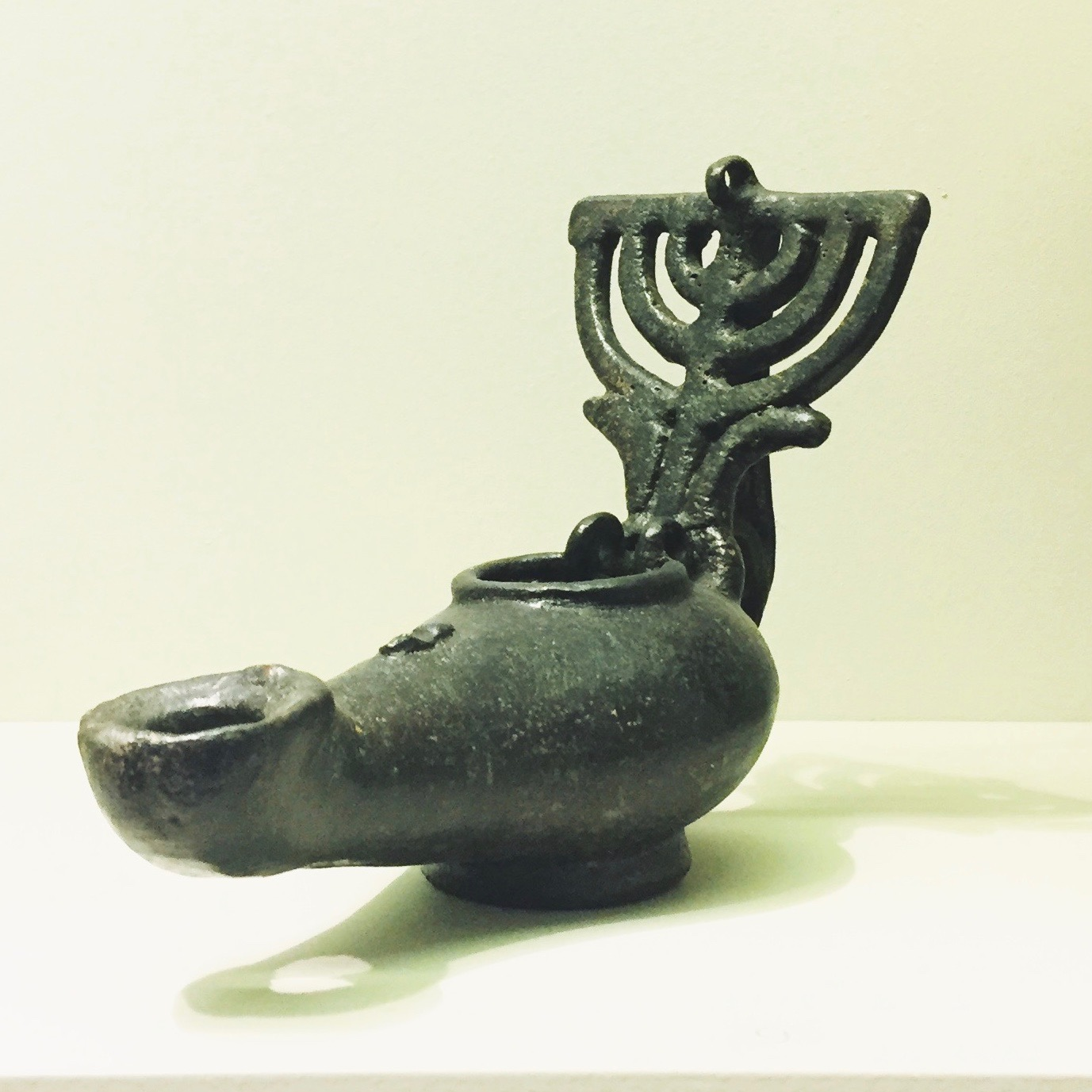 قنديل زيت عليه رمز المينوراه اليهودية نحاس، من صنع رومي من القرن الرابع-الخامس 11.4 س.م. متحف التاريخ والحضارات (الرباط) عثر عليها في أطلال مدينة وليلي في المغرب